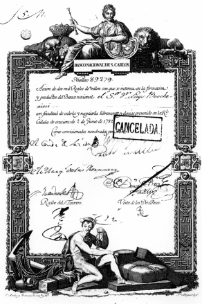 Billet de la banque de San Carlos au nom de Luys Boccherini.